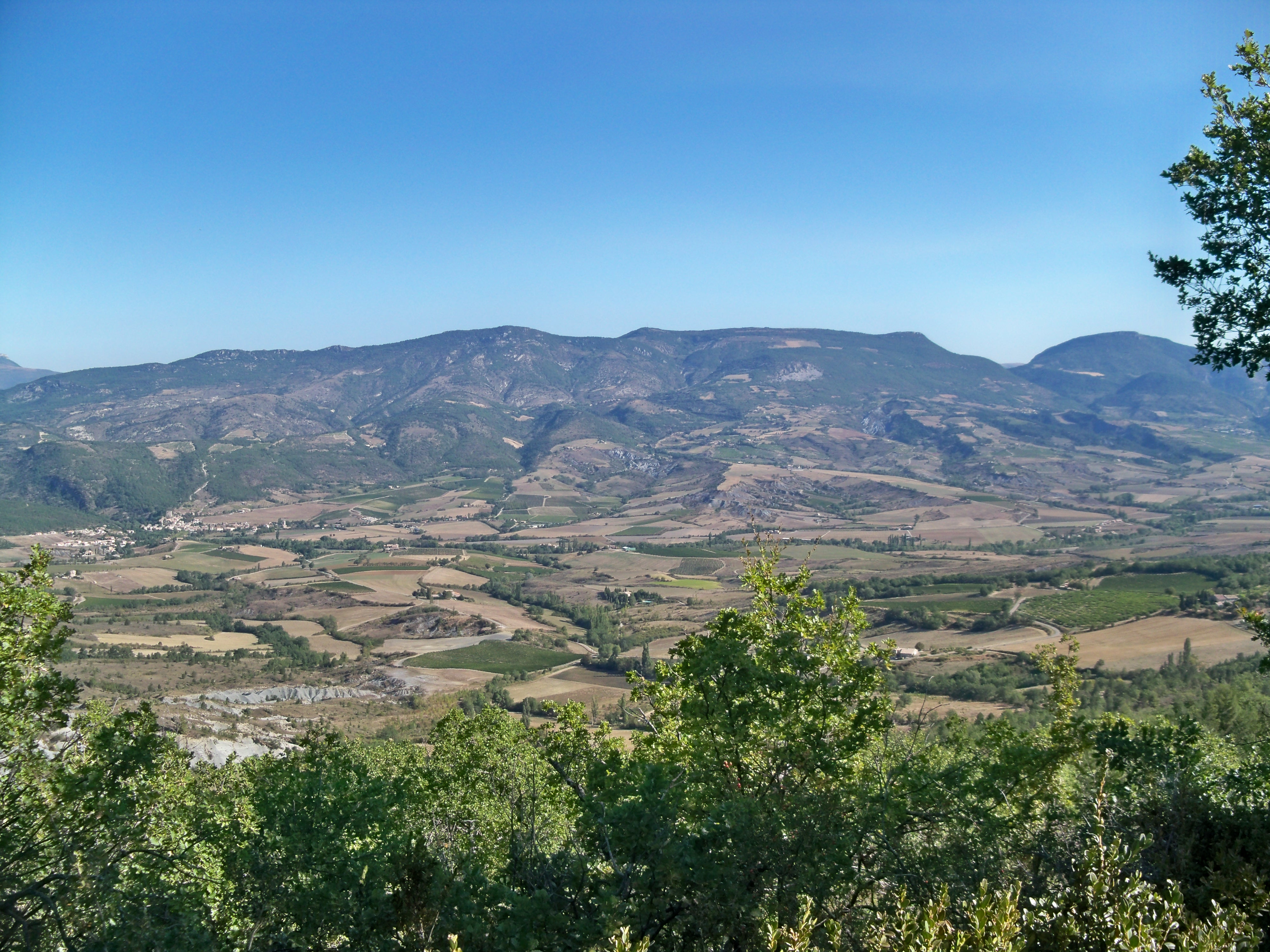 Vue du Col d'Ey vers la vallée d'Ennuye et Sainte Jalle. En arrière plan, la montagne de Buisseron au centre et le Casset à droite.